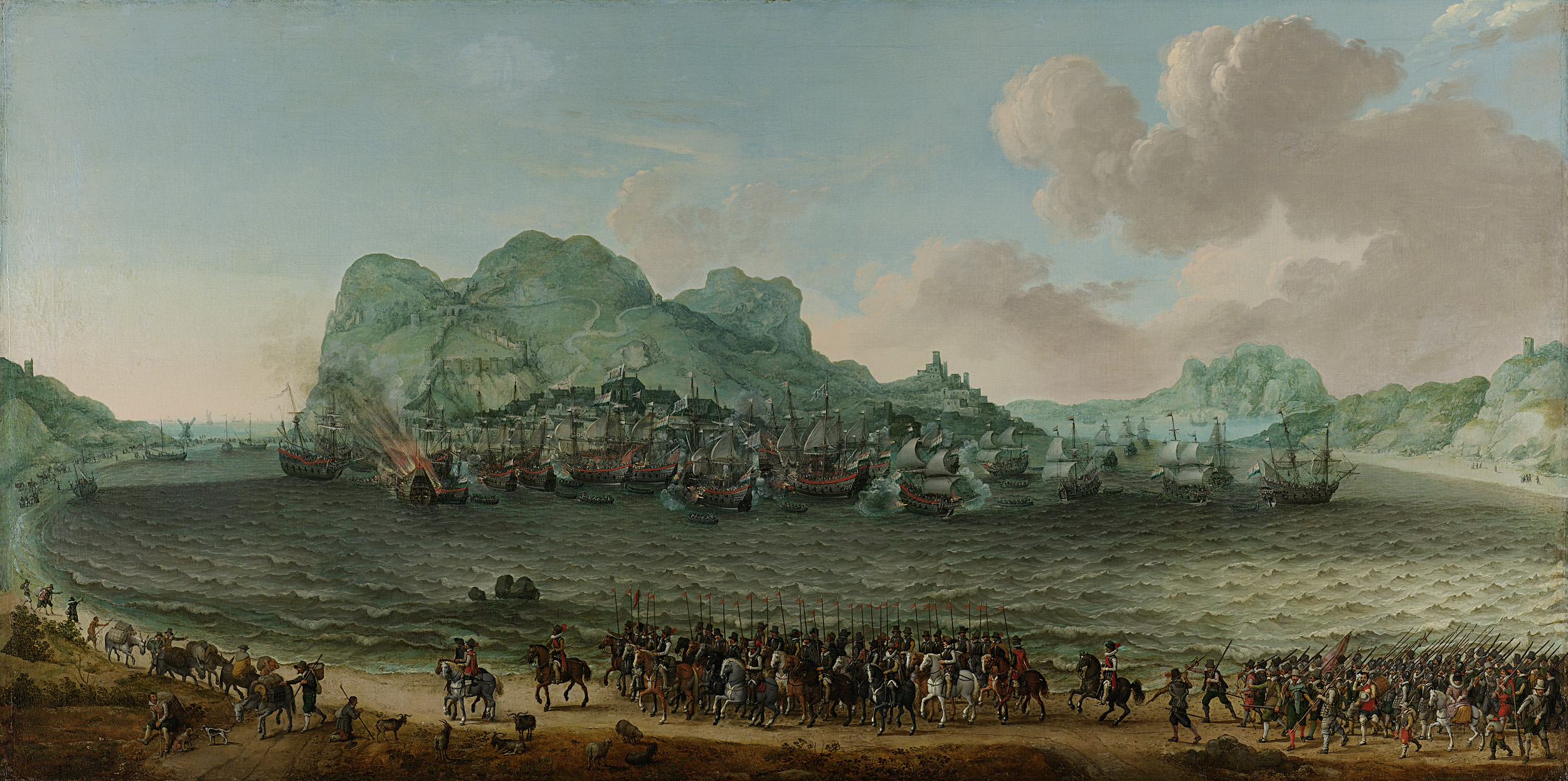 De overwinning op de Spanjaarden bij Gibraltar door een vloot onder bevel van Jacob van Heemskerck, 25 april 1607. In de verte woedt de zeeslag bij de rots van Gibraltar. Over het strand op de voorgrond marcheren een divisie cavalerie en een divisie infanterie.